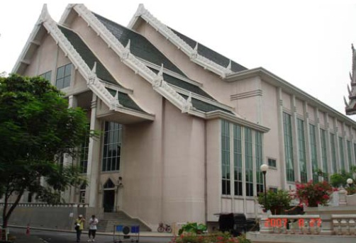 หอประชุมใหญ่ มหาวิทยาลัยธรรมศาสตร์